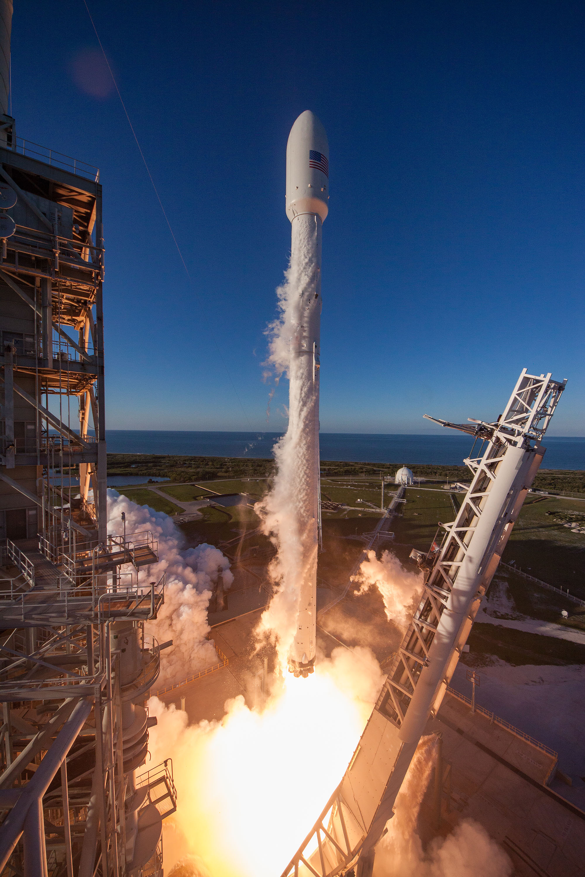 Intelsat 35e Mission